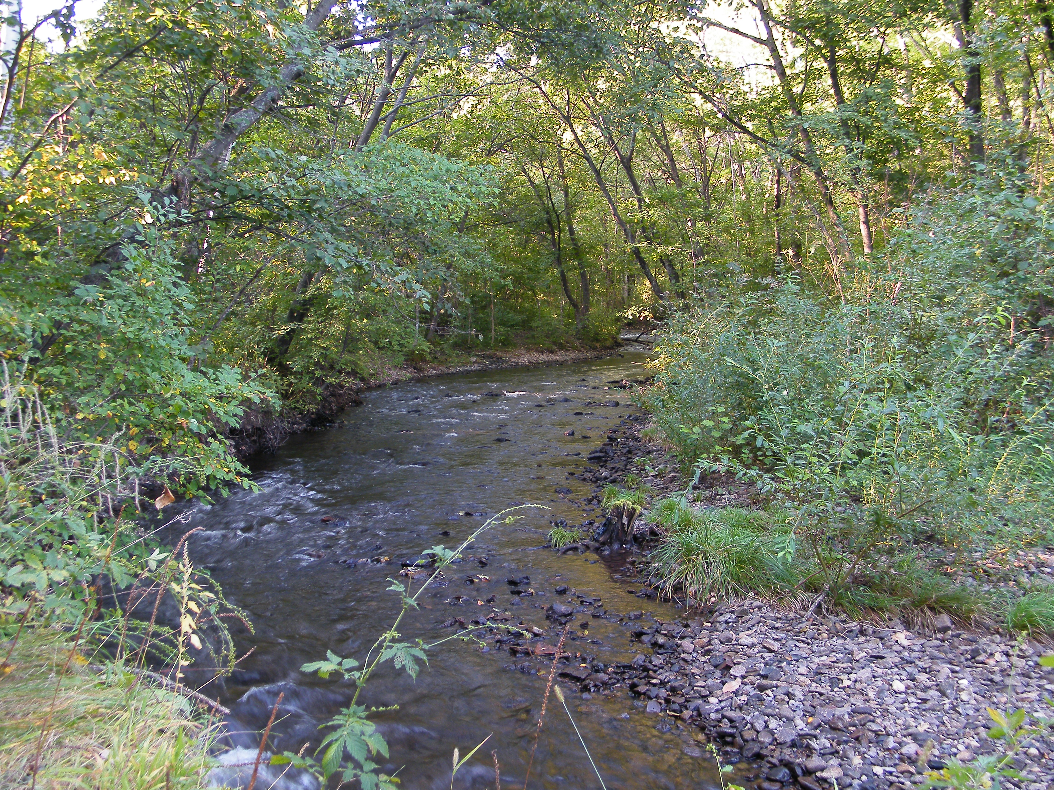 Река Бычиха, Хабаровский край